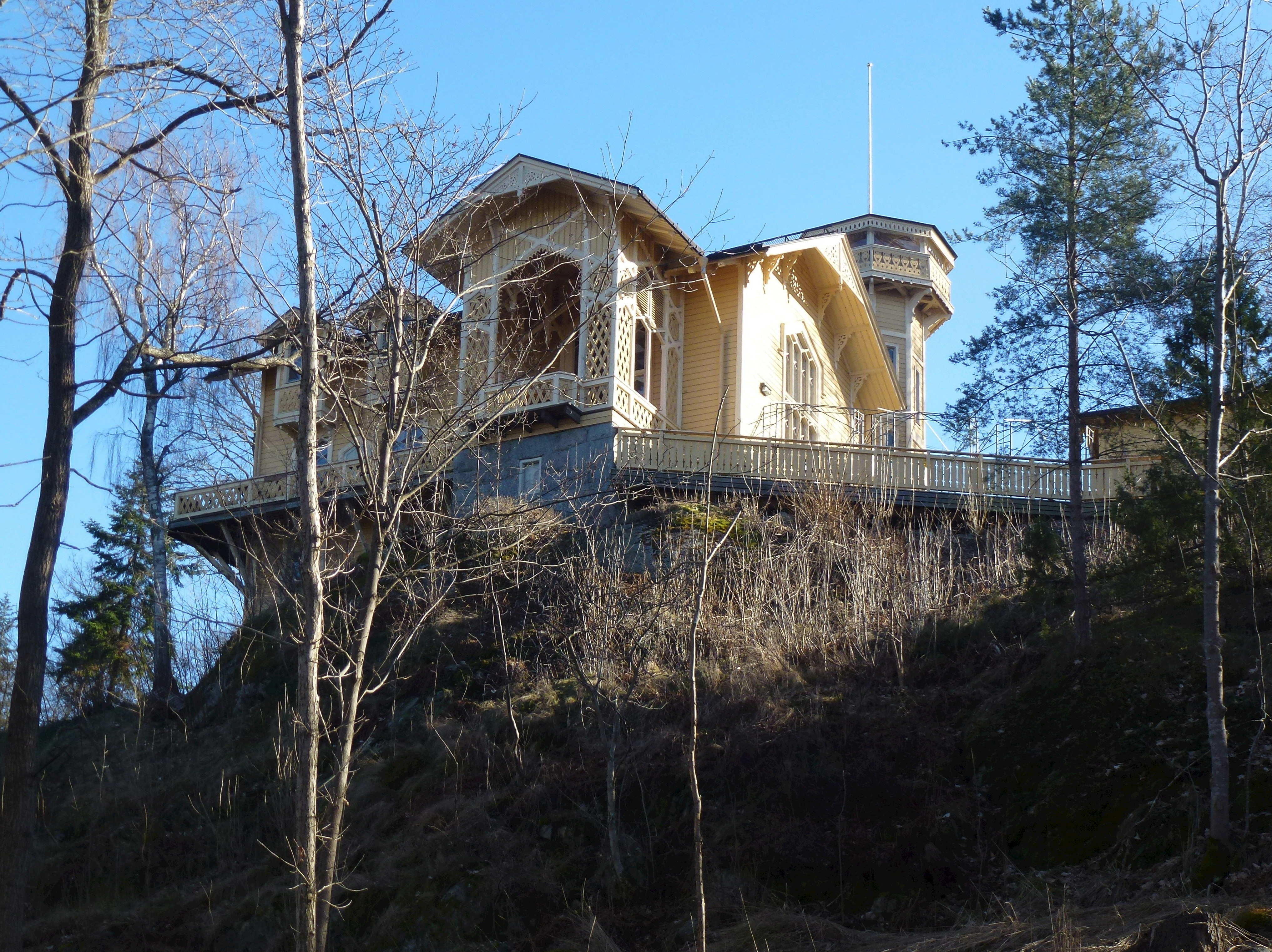 Villa Lyran från Mälarsidan